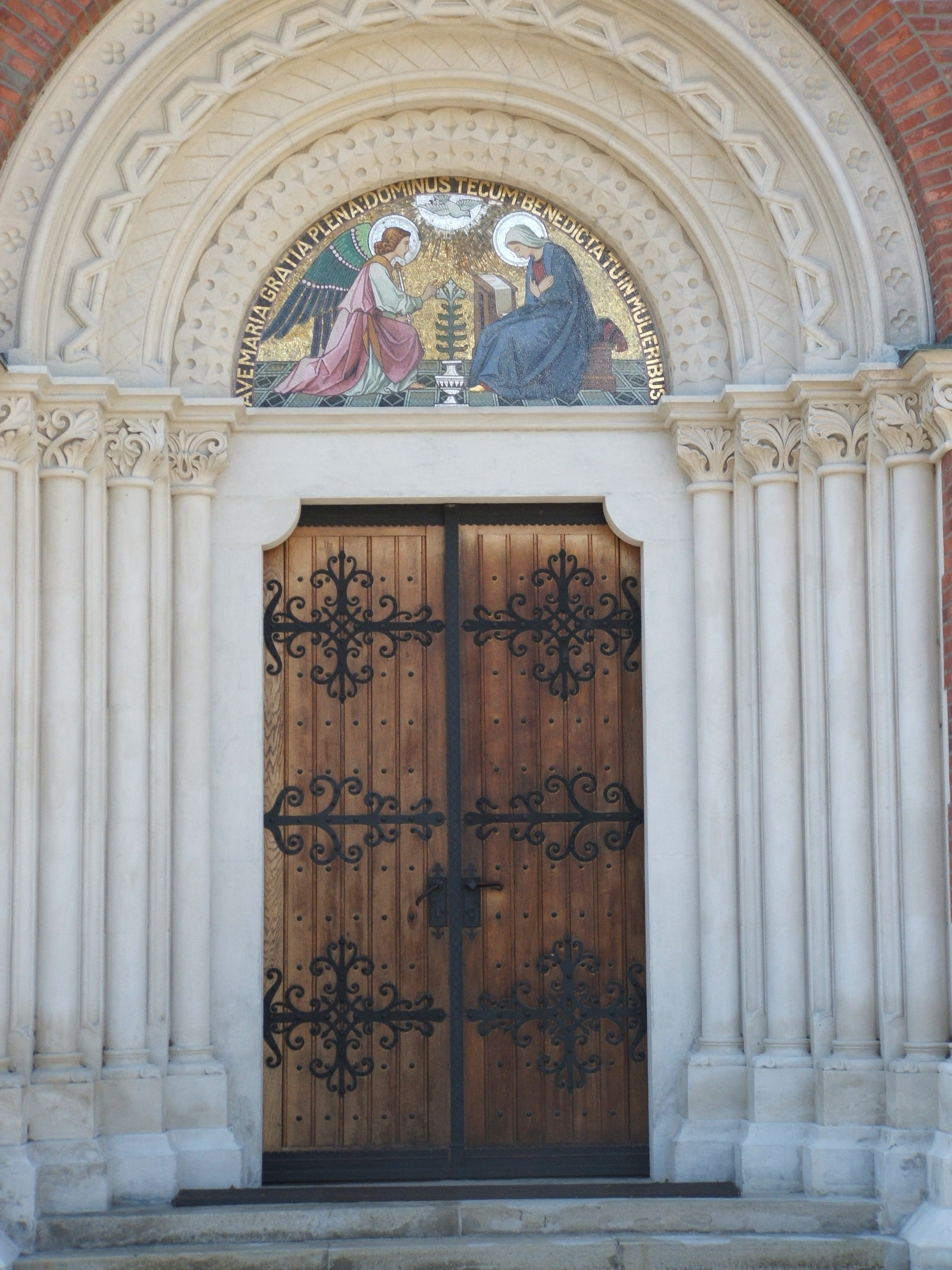 Maribor